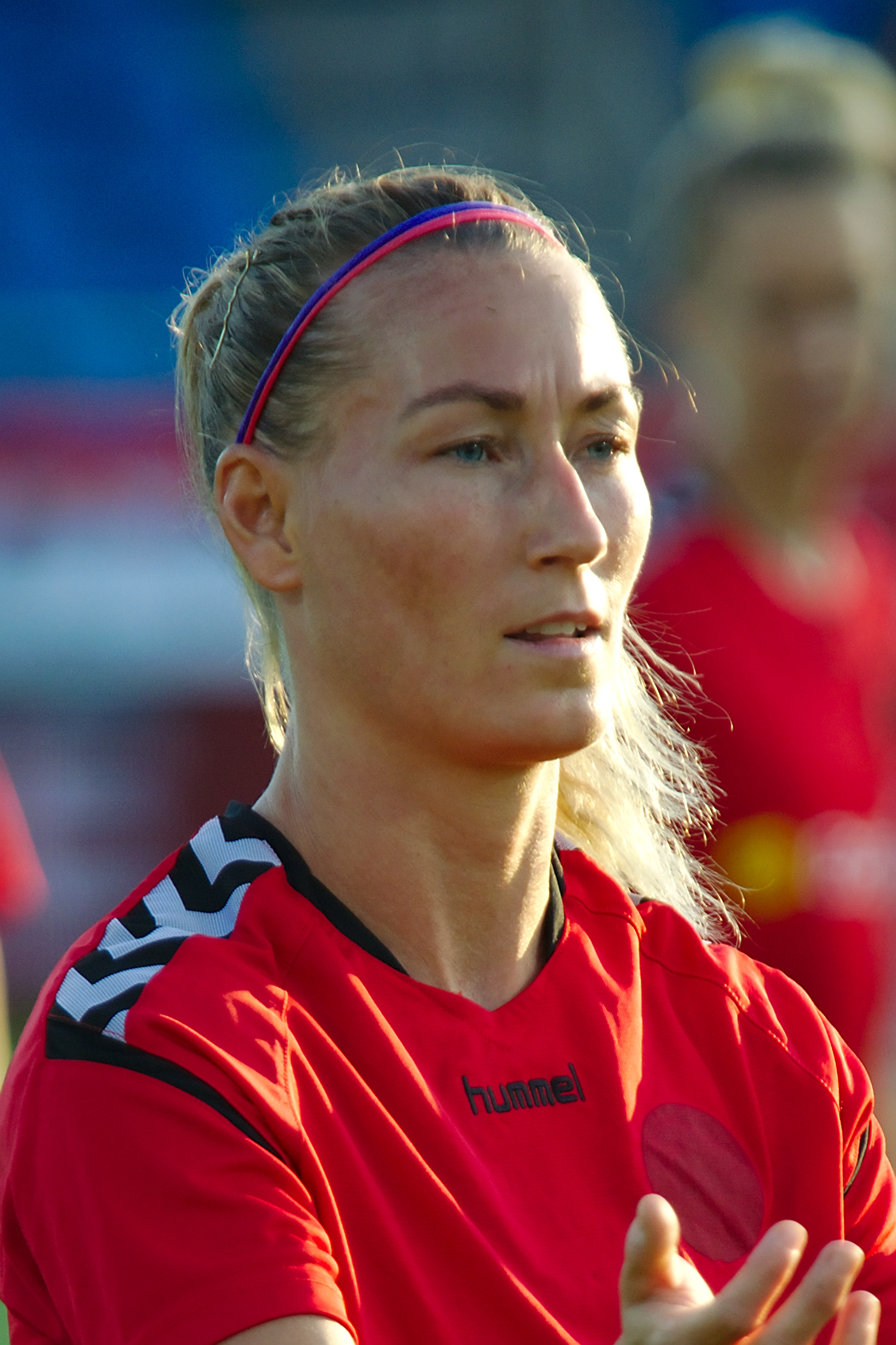 Freundschaftsspiel ÖFB Damen Nationalmannschaft gegen Dänemark am 6. Juli 2017. Bild zeigt: Theresa Nielsen